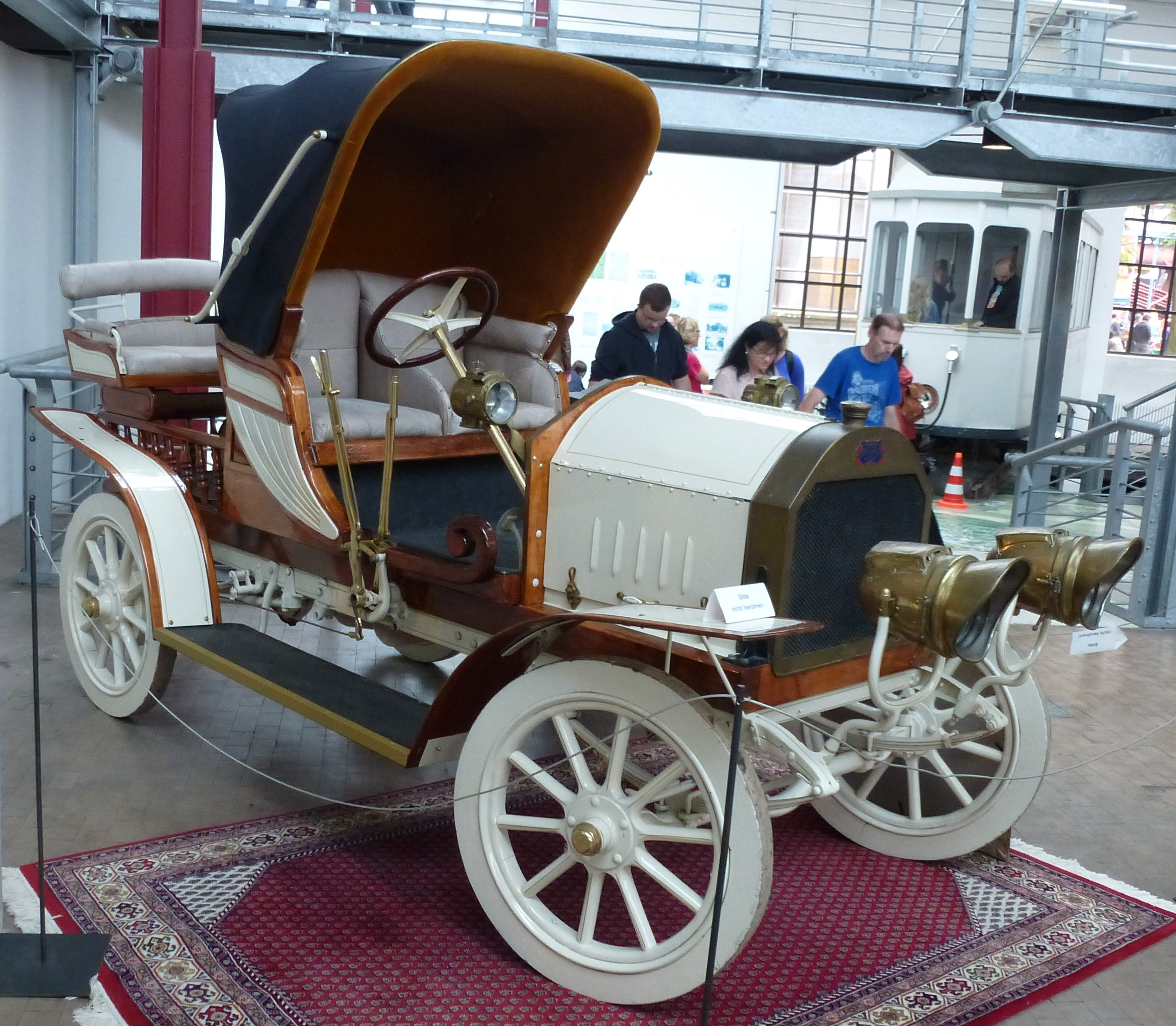 Dürkopp etwa 1905